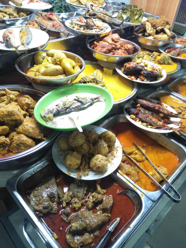 Masakan ini biasa disajikan di rumah makan padang